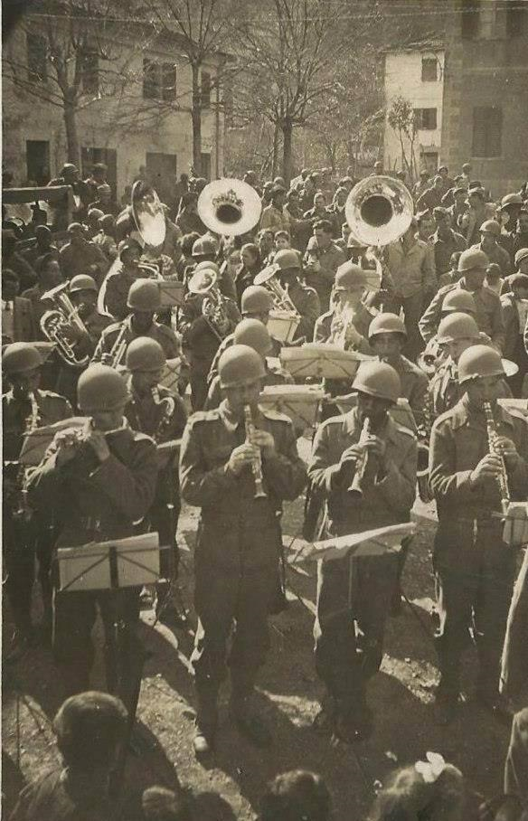 Banda de Música da FEB da Itália